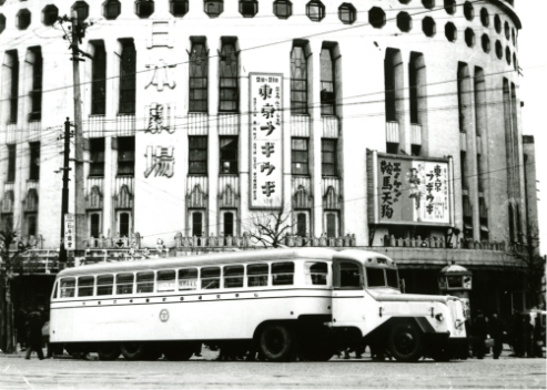 日野自動車 T11B・25型トレーラーバス